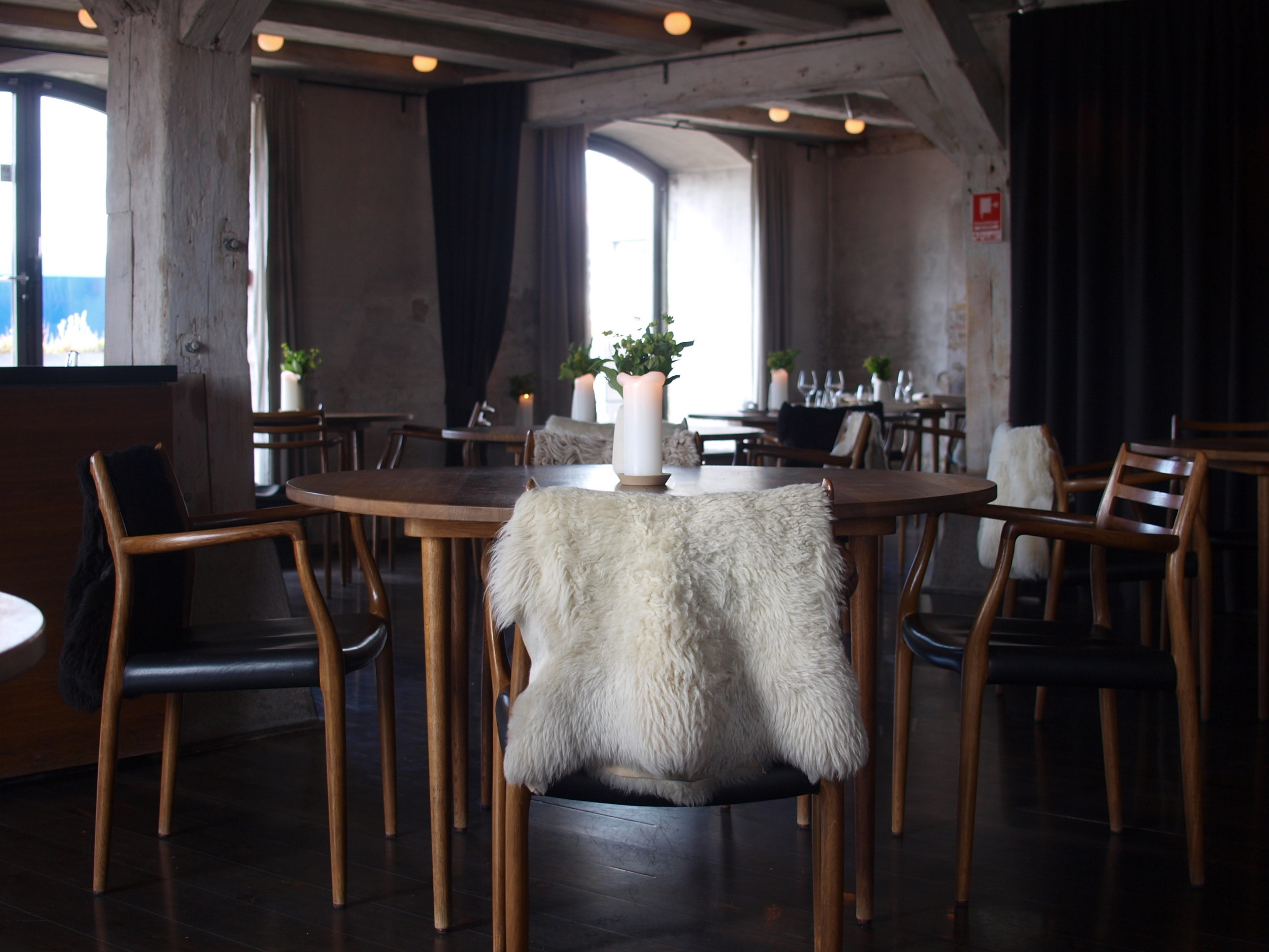 Copenhagen: Noma